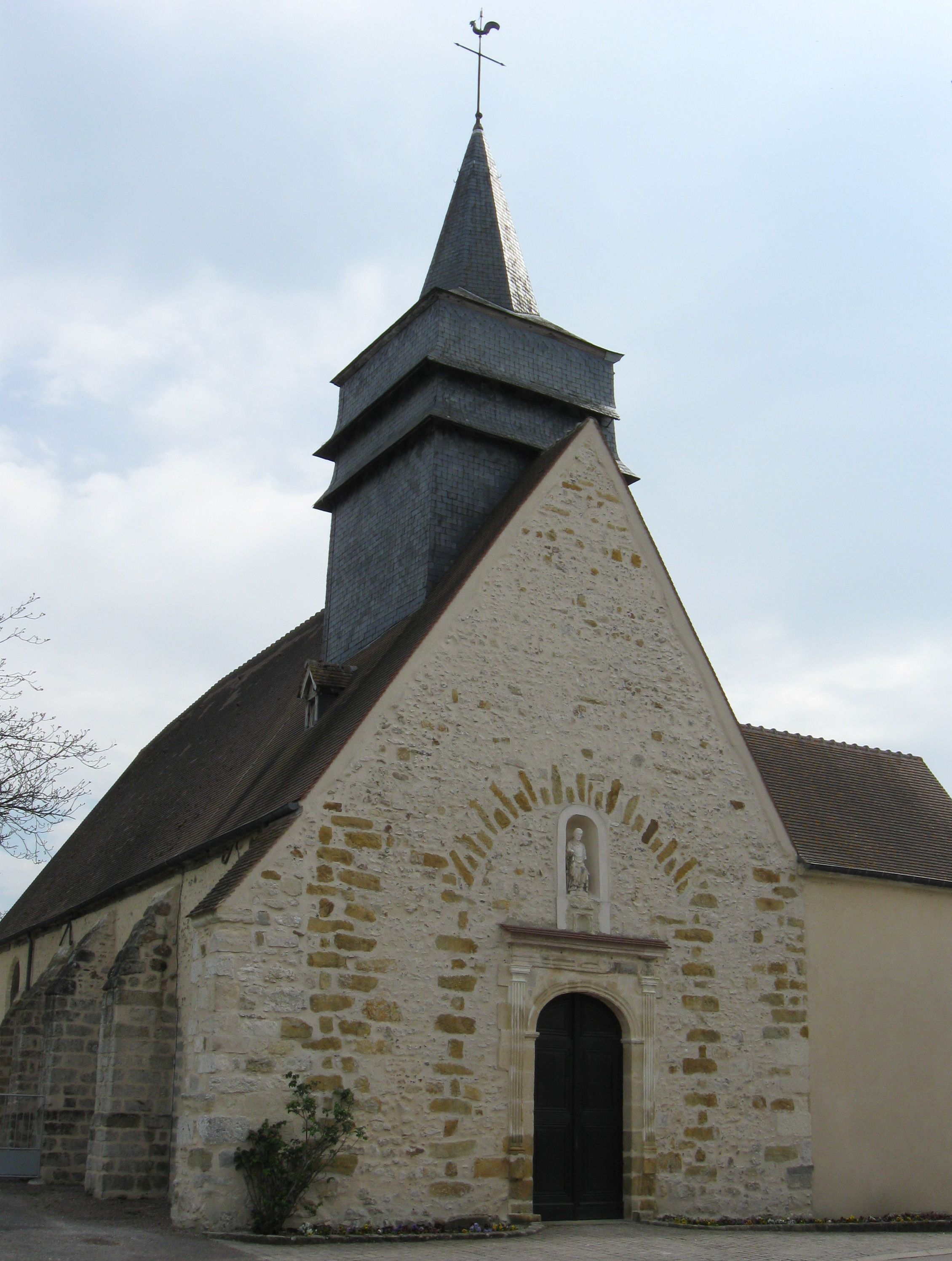 Église Saint-Pierre-Saint-Paul de Bazoches-lès-Bray. (Seine-et-Marne, région Île-de-France).